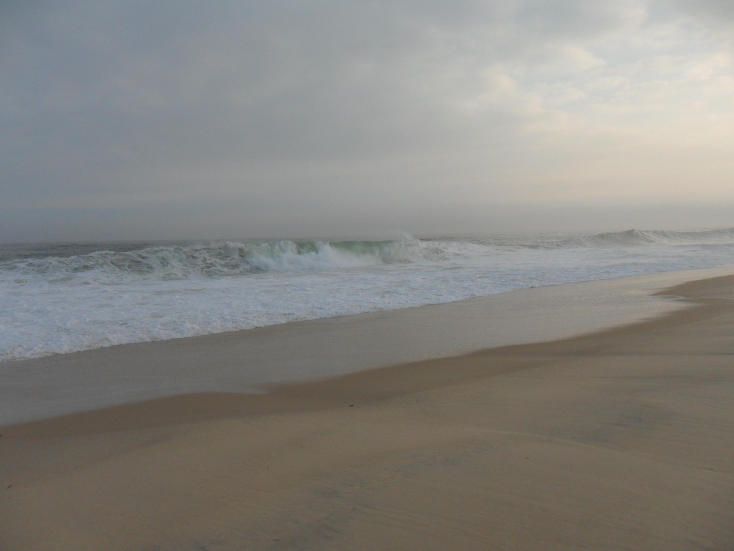 Praia de mar aberto, em Cordeirinho, Maricá, RJ. Ótima para pescaria e caminhadas. Praia muito sossegada fora das grandes épocas de feriado. Ondas altas na maior parte do tem atraem surfistas e afins. Formam-se pequenas piscinas naturais, propiciando uma boa diversão para as crianças.